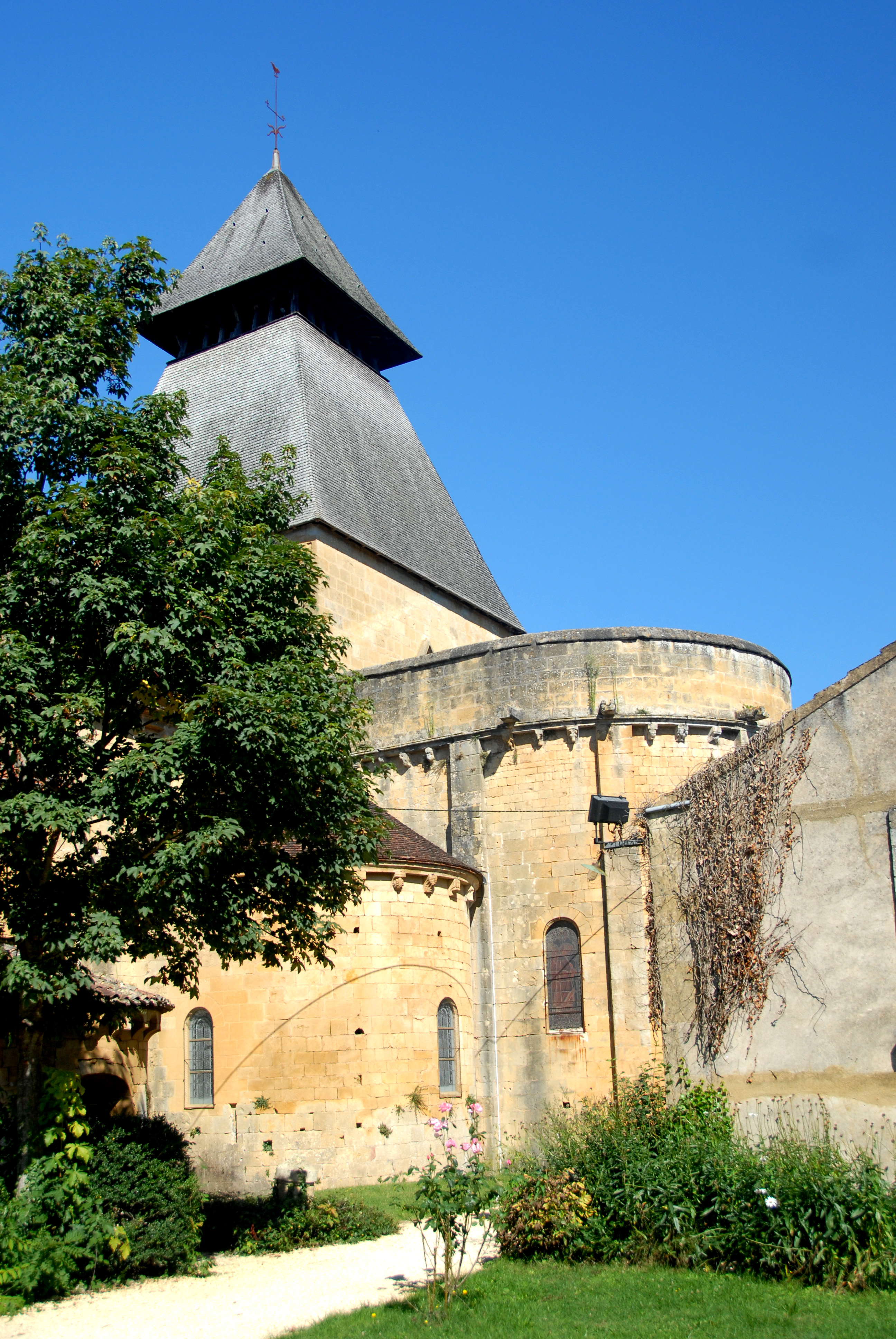 Cadouin, Chorhaupt von SO